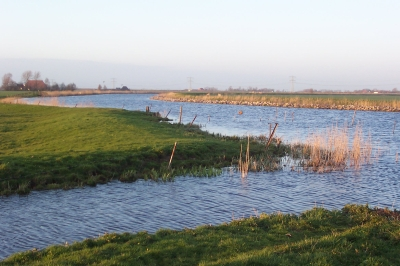 Grou (wetter)